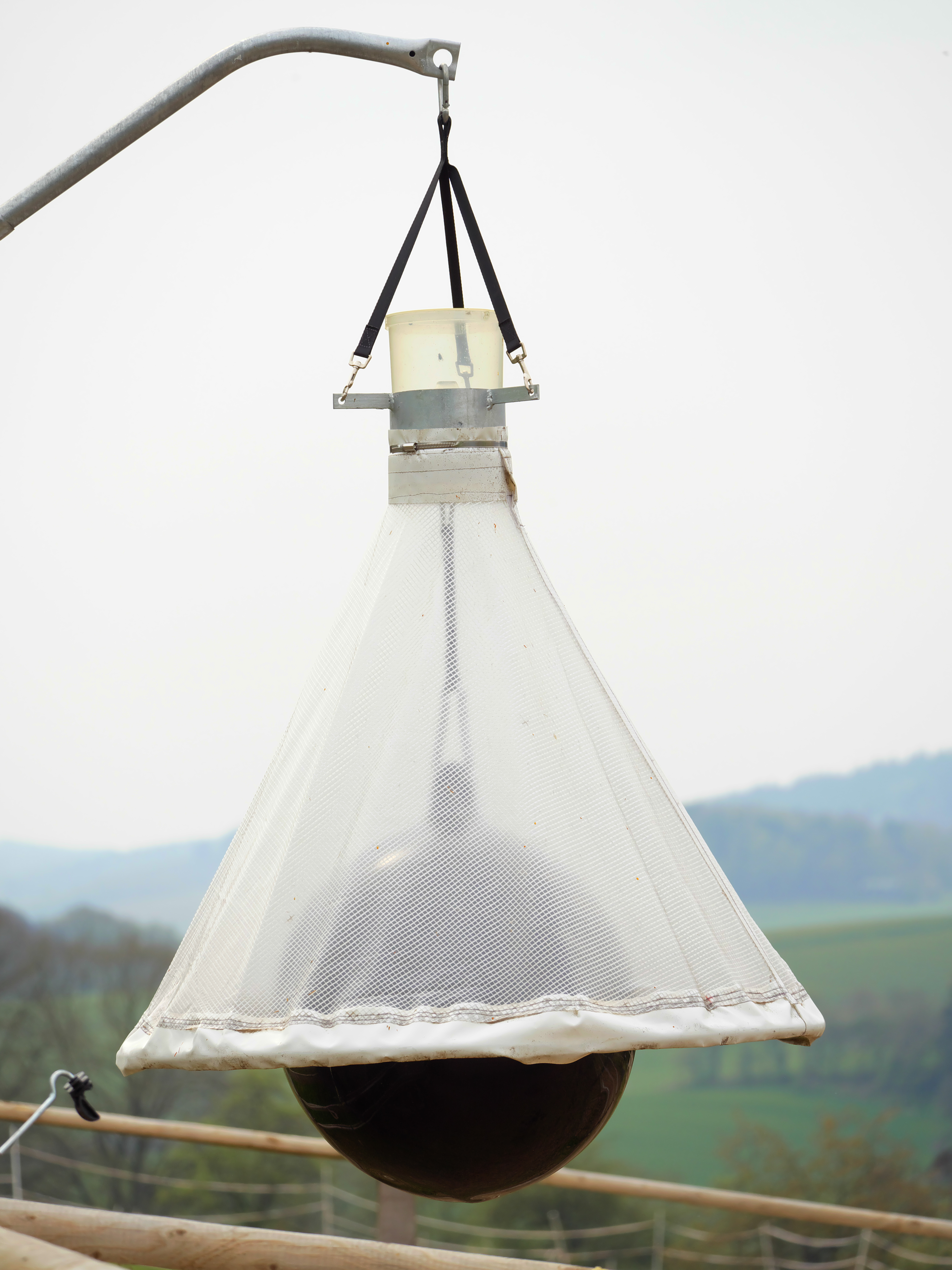 Fliegenbremsenfalle an einer Pferdekoppel